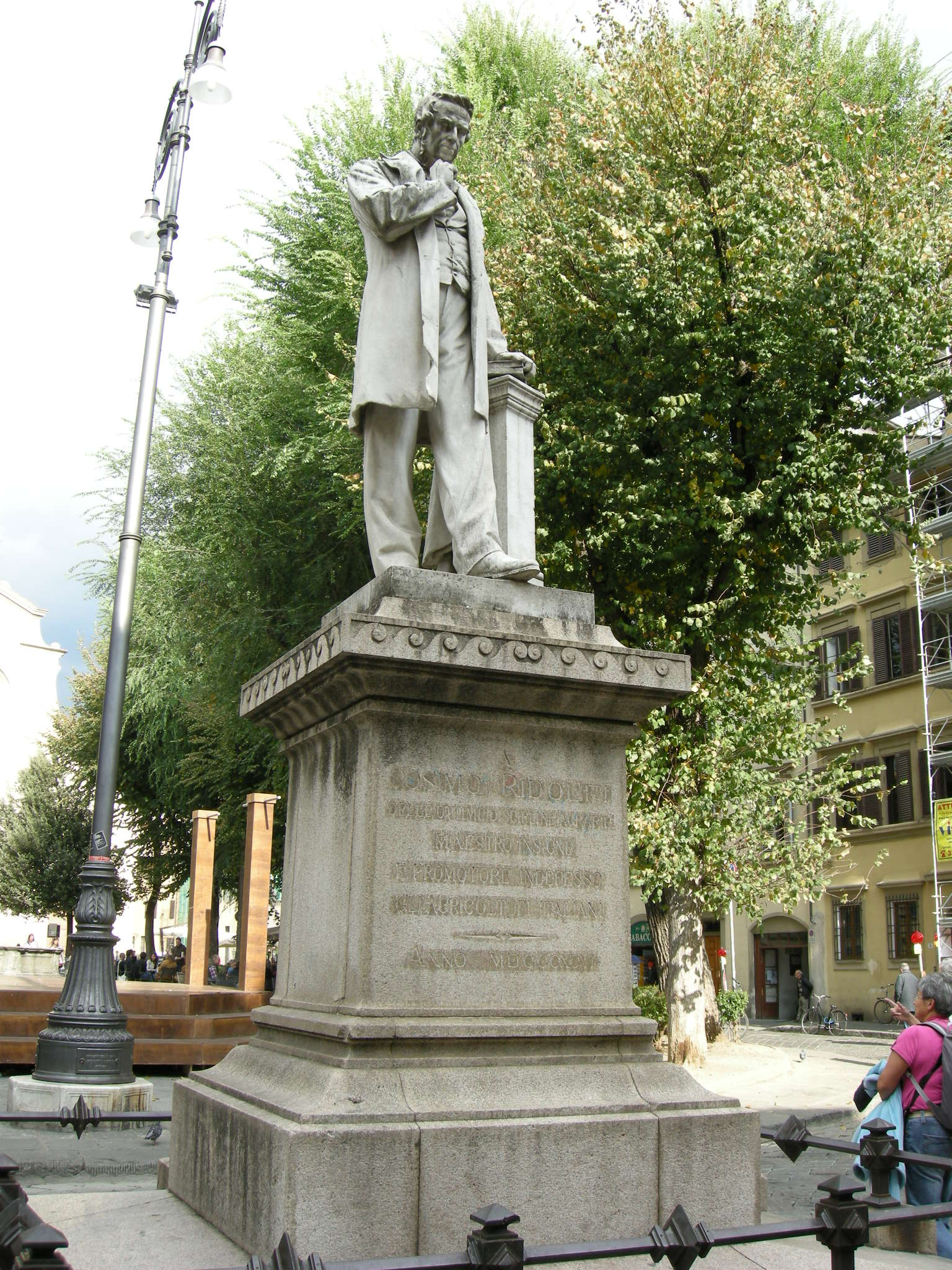 Il monumento a Cosimo Ridolfi, in Piazza Santo Spirito a Firenze, opera dello scultore Raffaello Romanelli (1856-1928).